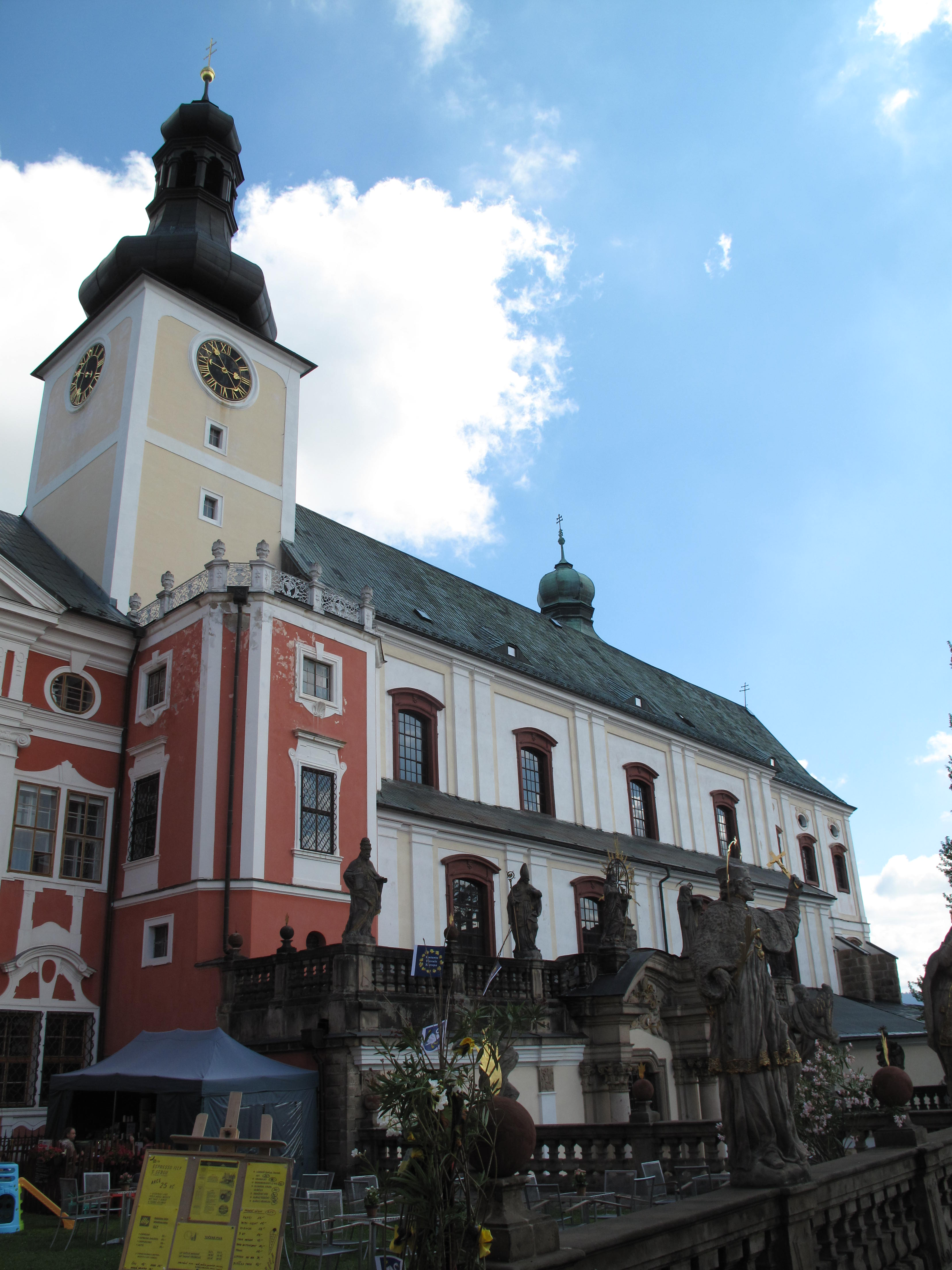 Česky: Broumov